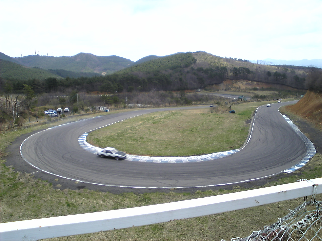 エビスサーキット東コース